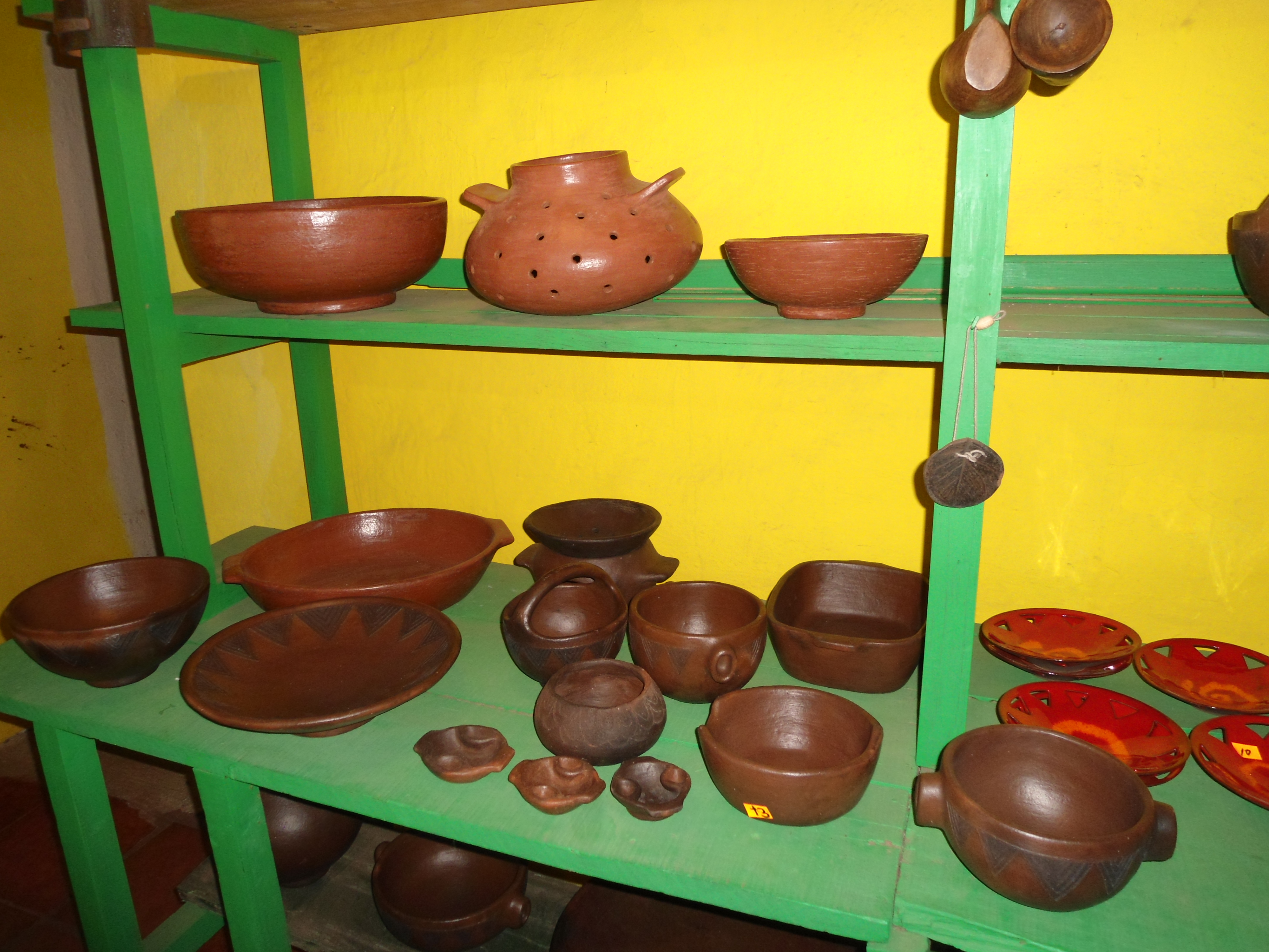 Poteries d'El Cercado La Gomera Canarias